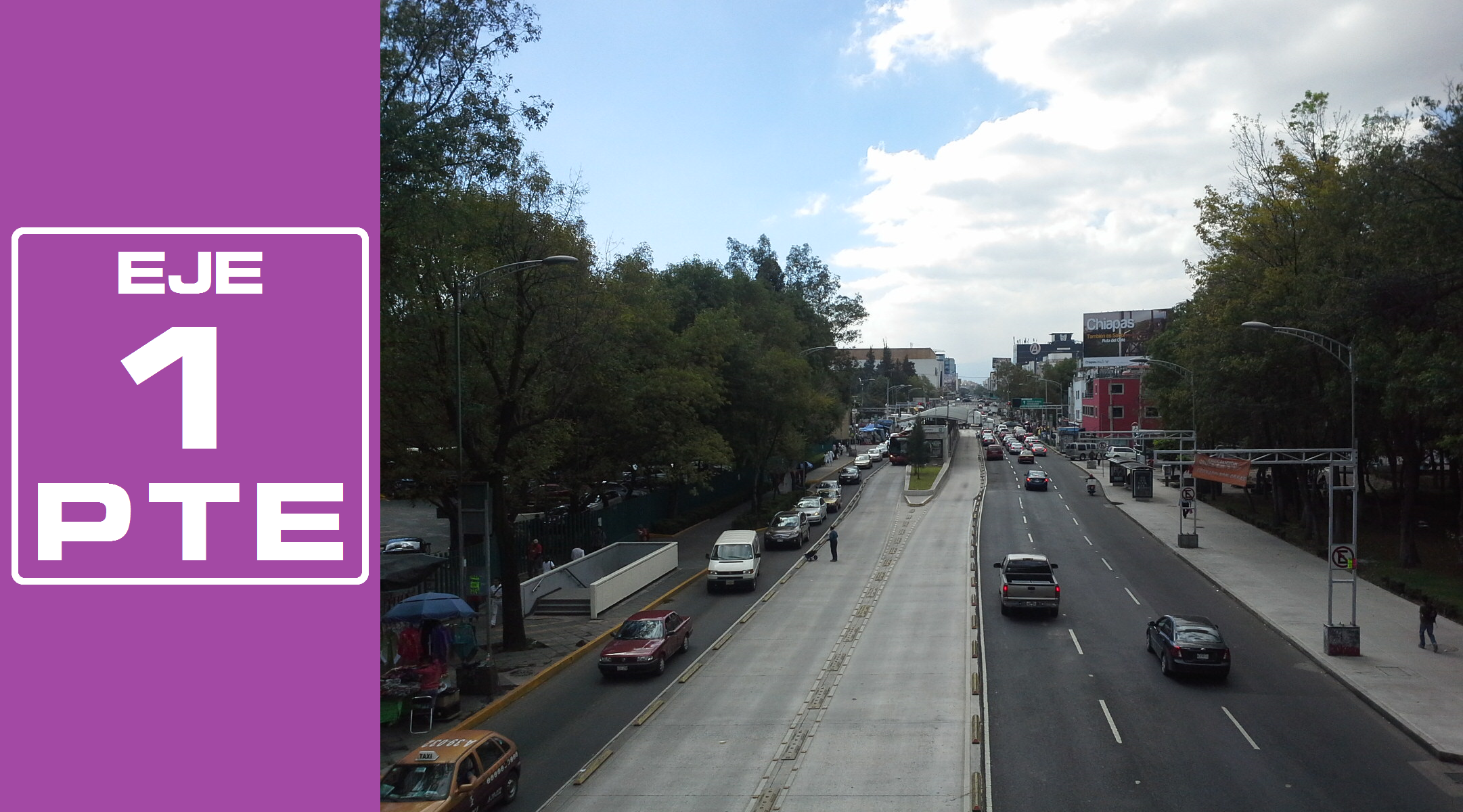 Rediseñado original de la señalética de los Ejes viales de la Ciudad de México por José García (Wiki ID: narumiyama)